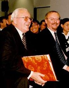 Bundespräsident Roman Herzog im Ostasieninstitut